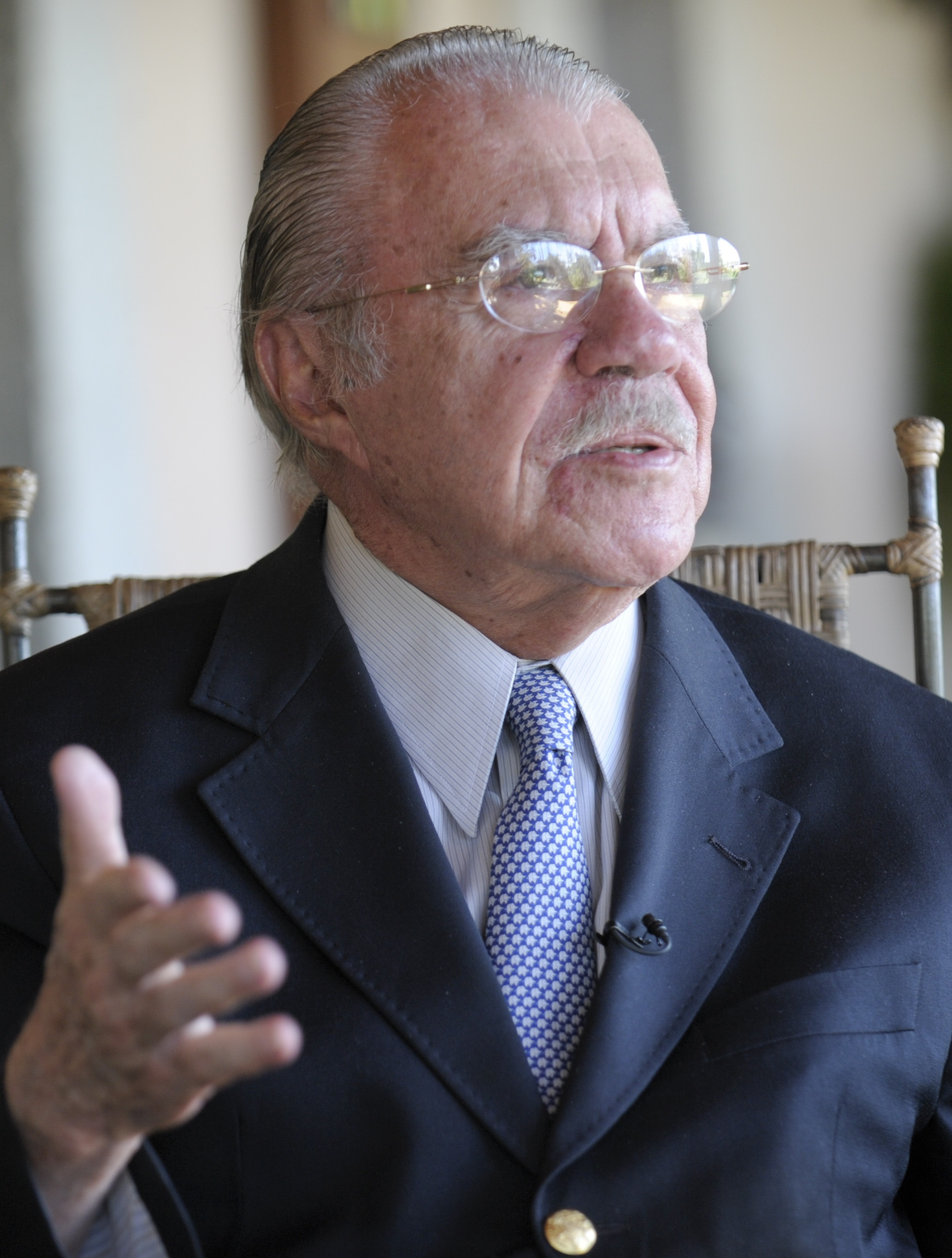 José Sarney concede entrevista.Foto: Jefferson Rudy/Agência Senado